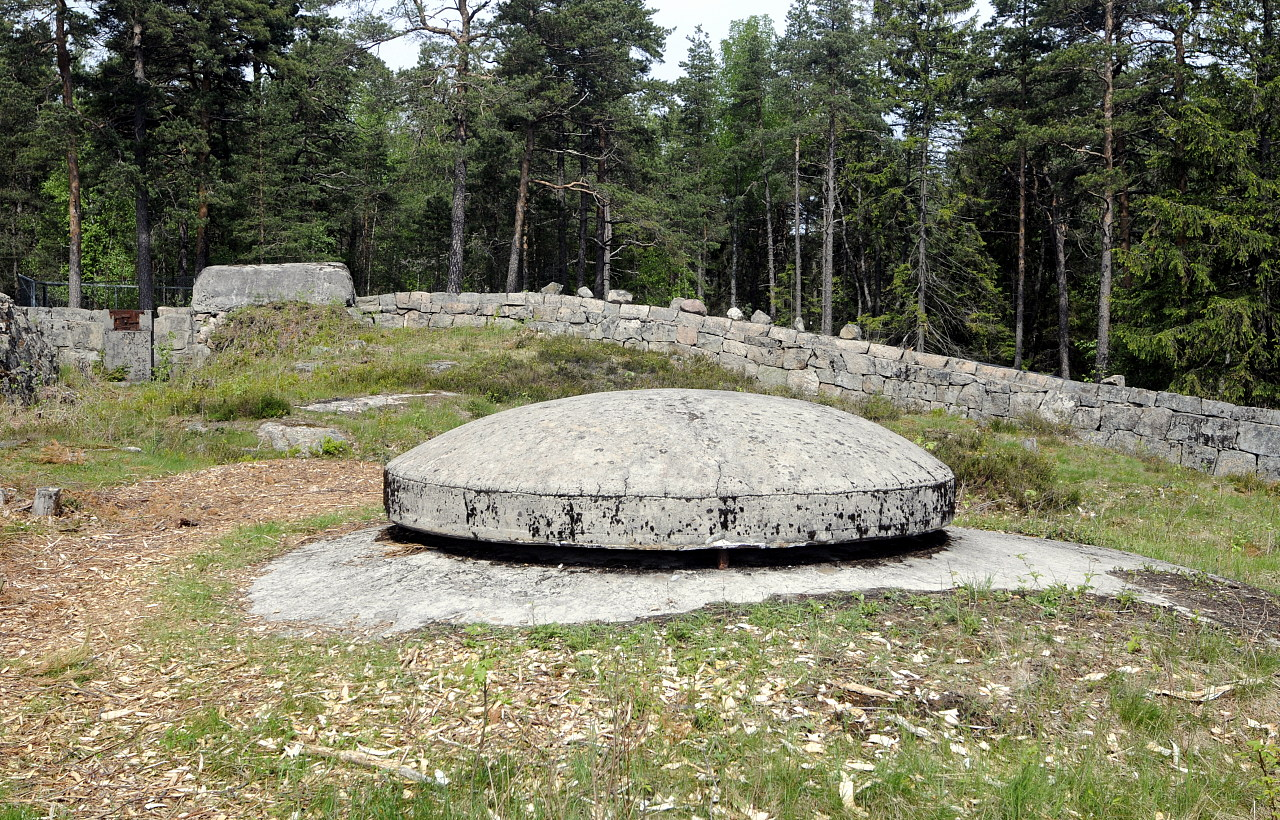 Kommandostandplass ved Ravneberget fort